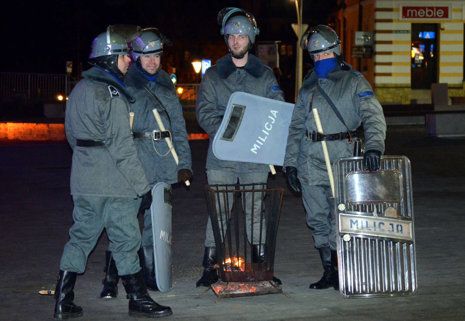 33 Jahre nach Ausrufung des Kriegsrechts in Polen, Sanok.